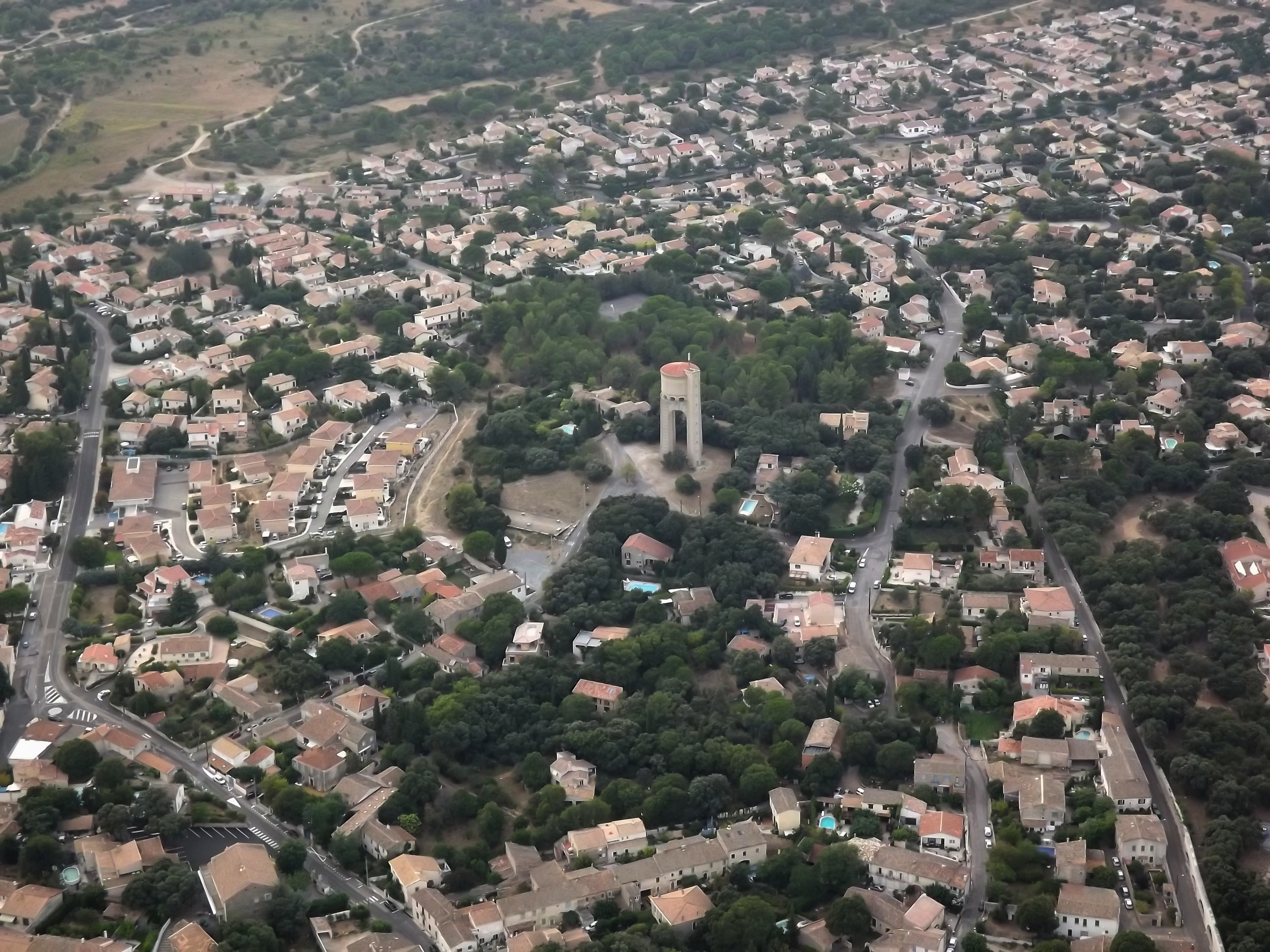 Chateau d'eau de castrie